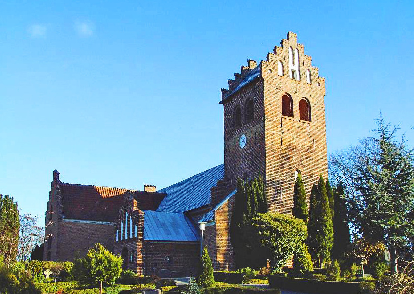 fra nordvest